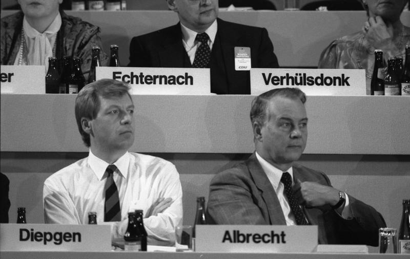 9.11.1987 35. Bundesparteitag der CDU in der Beethovenhalle, Bonn